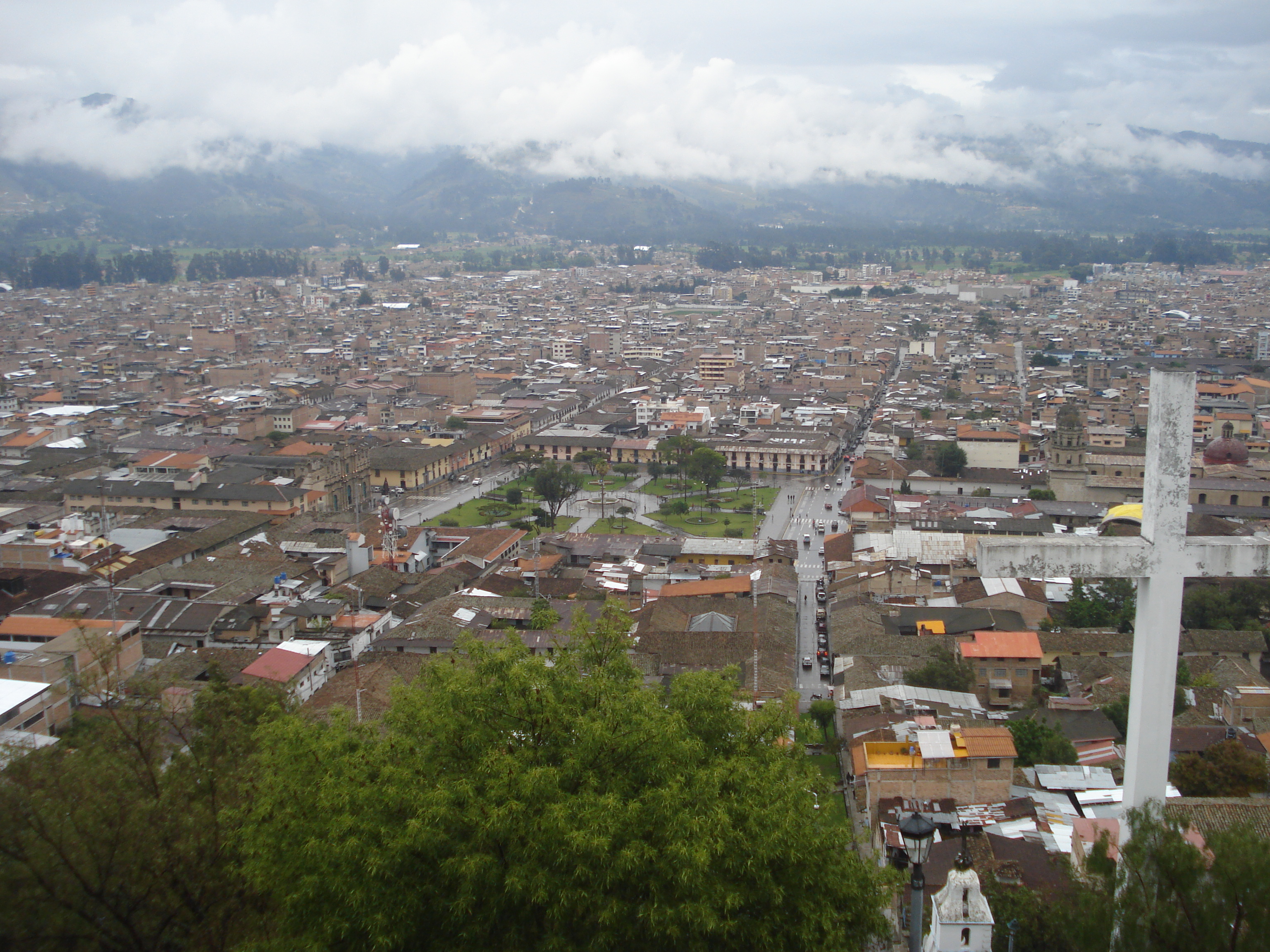 Vista de la Plaza de Armas de Cajamarca desde la colina Santa Apolonia